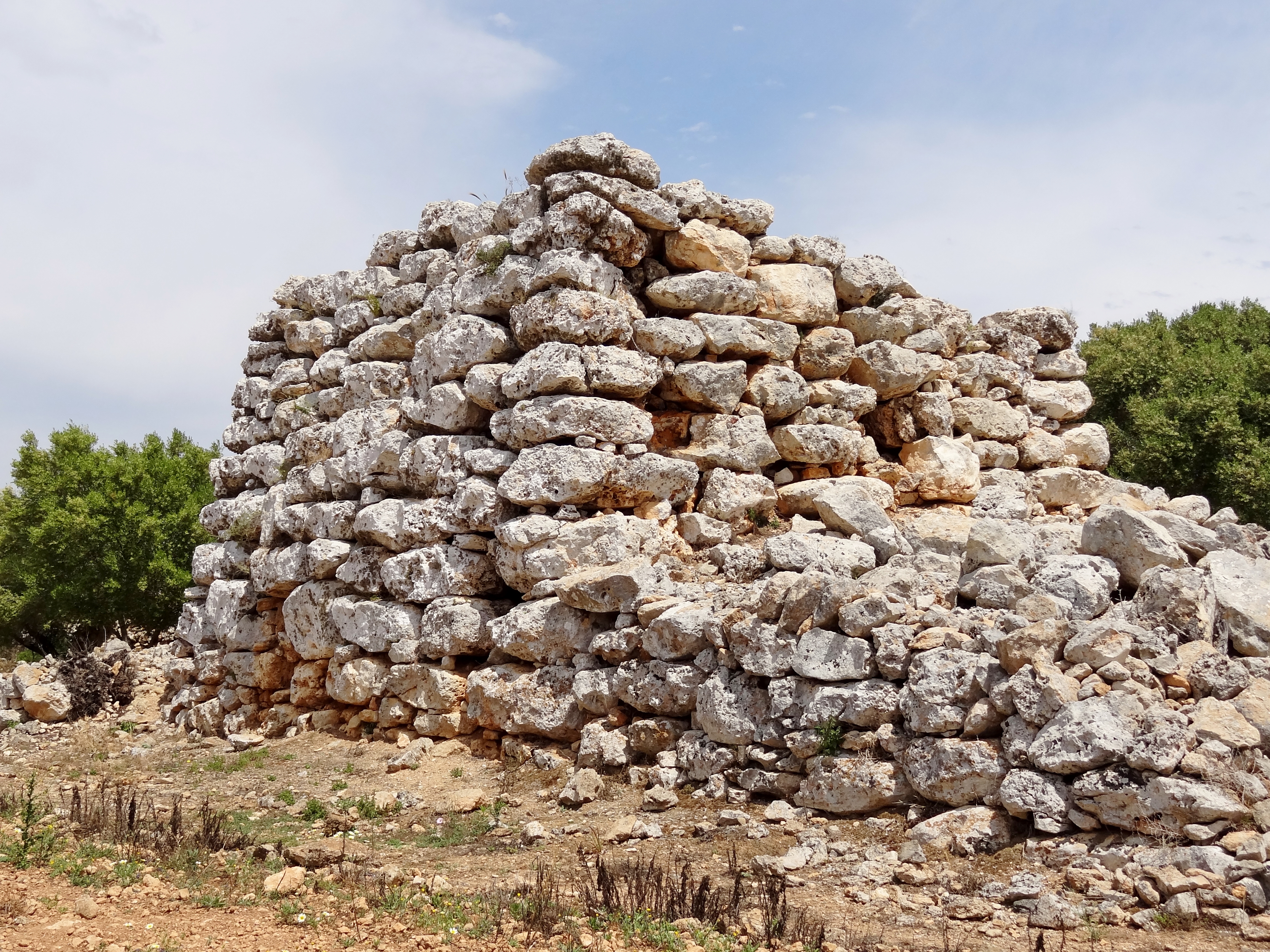 Quadratischer Talaiot A in der Ausgrabungsstätte von Capocorb Vell, Gemeinde Llucmajor, Mallorca, Spanien